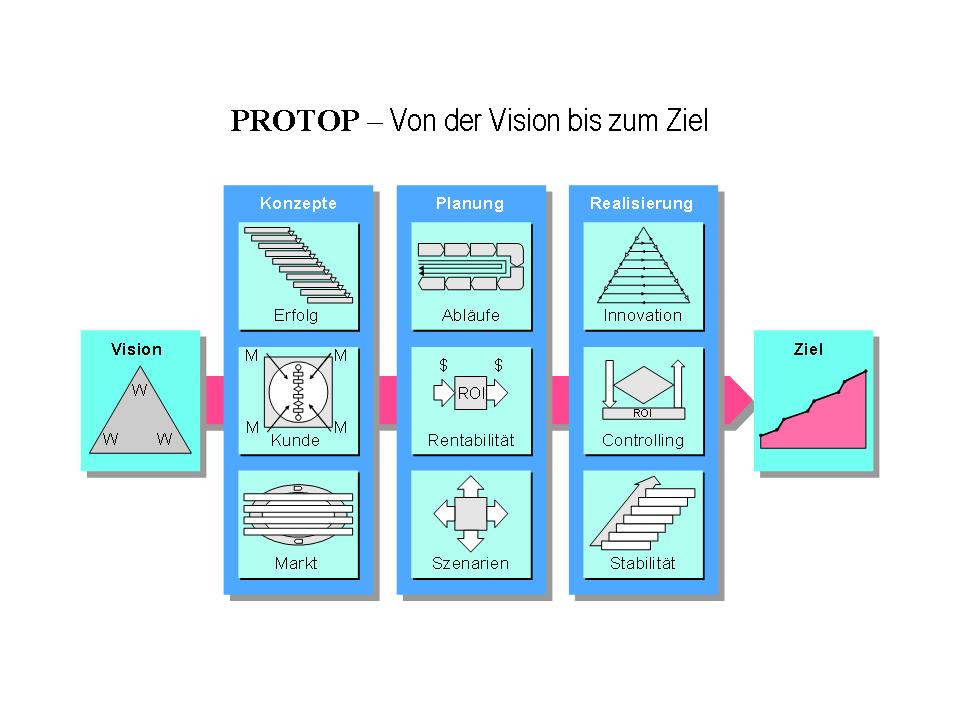 PROTOP - Von der Vision bis zum Ziel